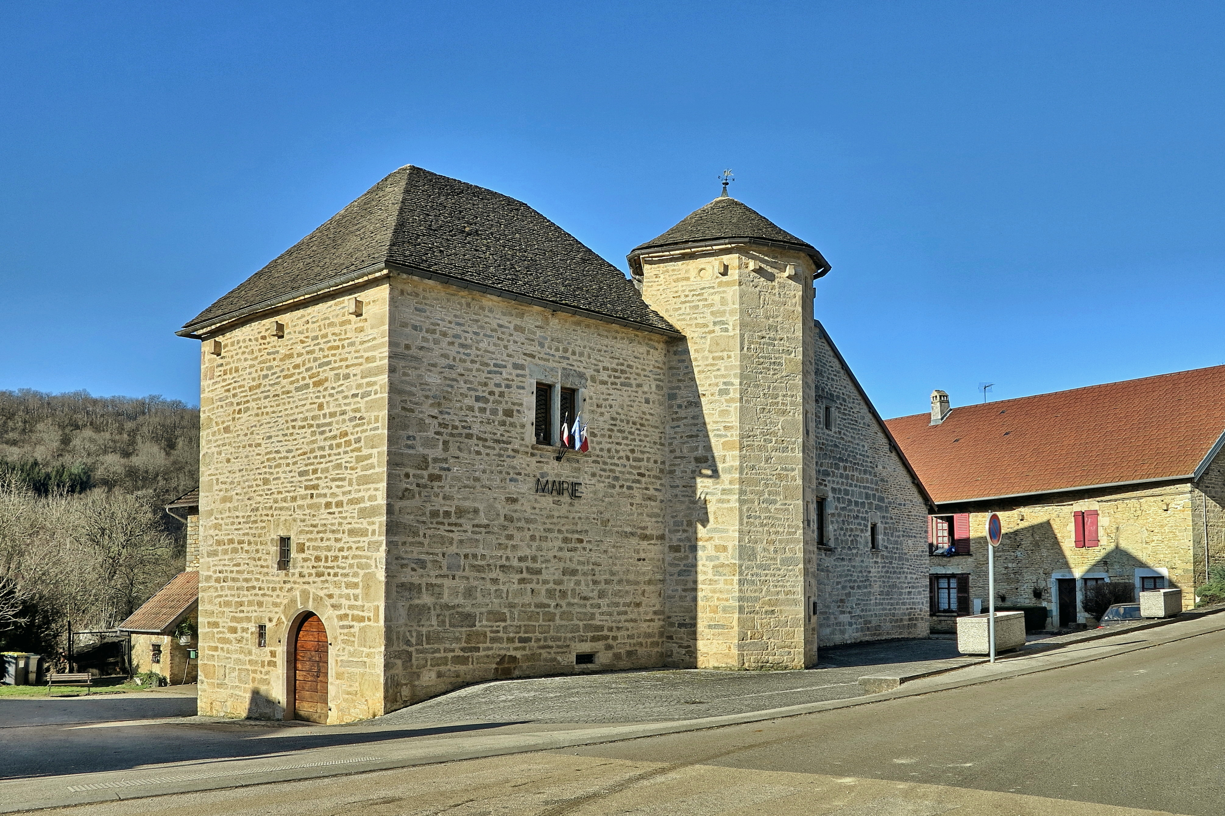 Inscrit aux monuments historiques sous le numéro : PA00101639